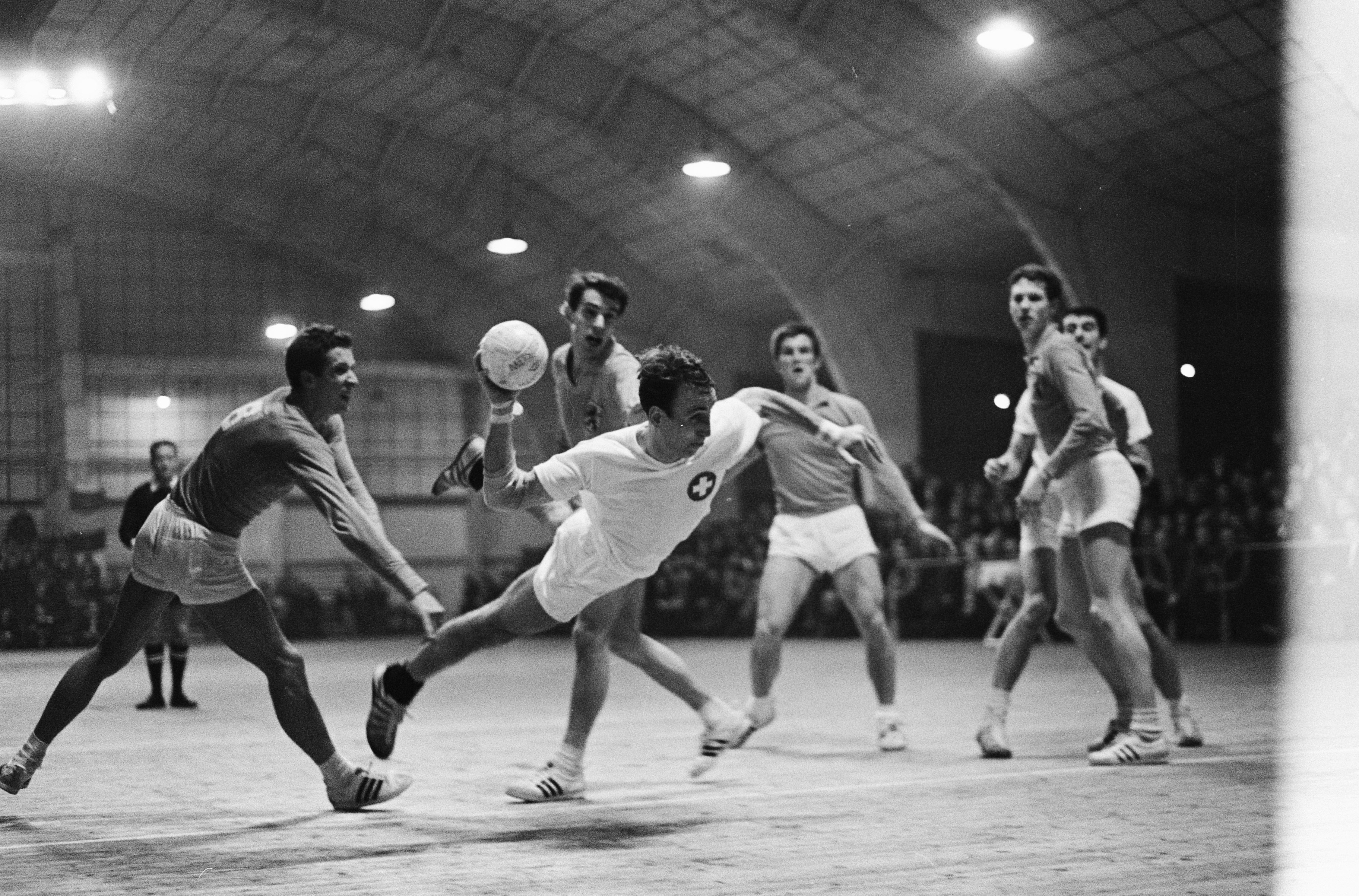 Collectie / Archief : Fotocollectie Anefo Reportage / Serie : [ onbekend ] Beschrijving : Zaalhandbal Nederland tegen Zwitserland 8-14, Bruno Schmidt voor Zwitserland scoort hier Datum : 26 februari 1966 Trefwoorden : Zaalhandbal Fotograaf : Kroon, Ron / Anefo Auteursrechthebbende : Nationaal Archief Materiaalsoort : Negatief (zwart/wit) Nummer archiefinventaris : bekijk toegang 2.24.01.05 Bestanddeelnummer : 918-8321